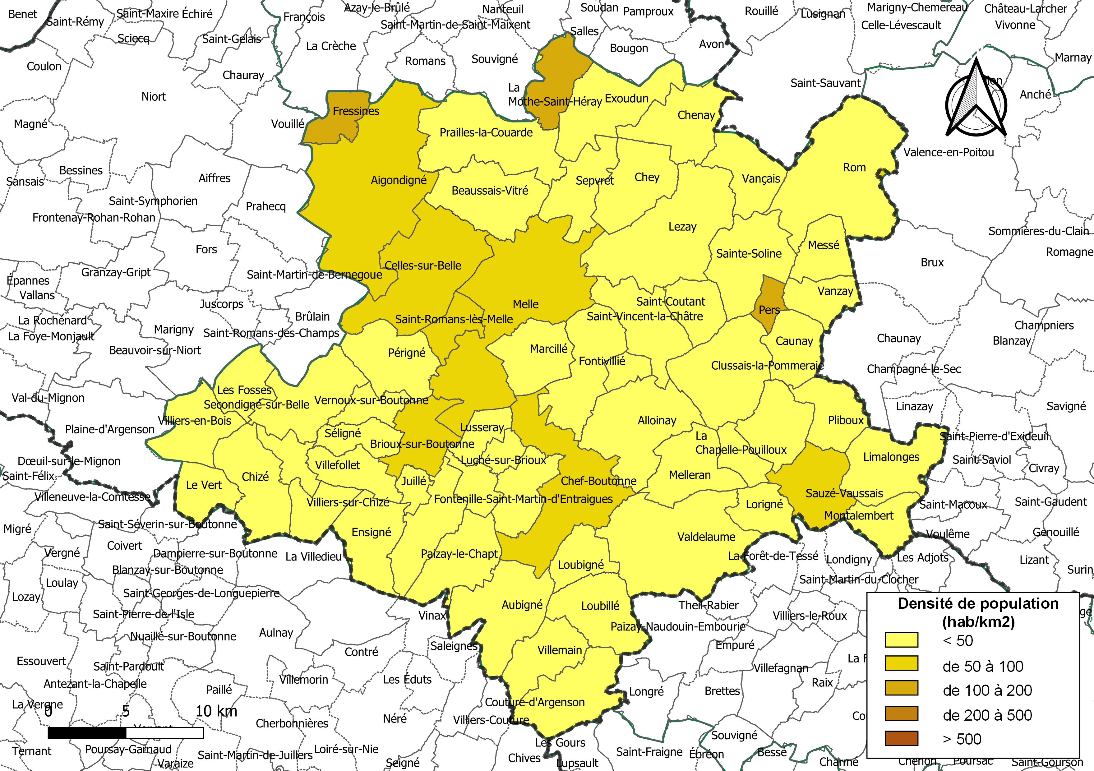 Carte des densités de population (millésimée 2016) des communes de la Communauté de communes Mellois en Poitou, département des Deux-Sèvres, France. Composition au 1er janvier 2019.